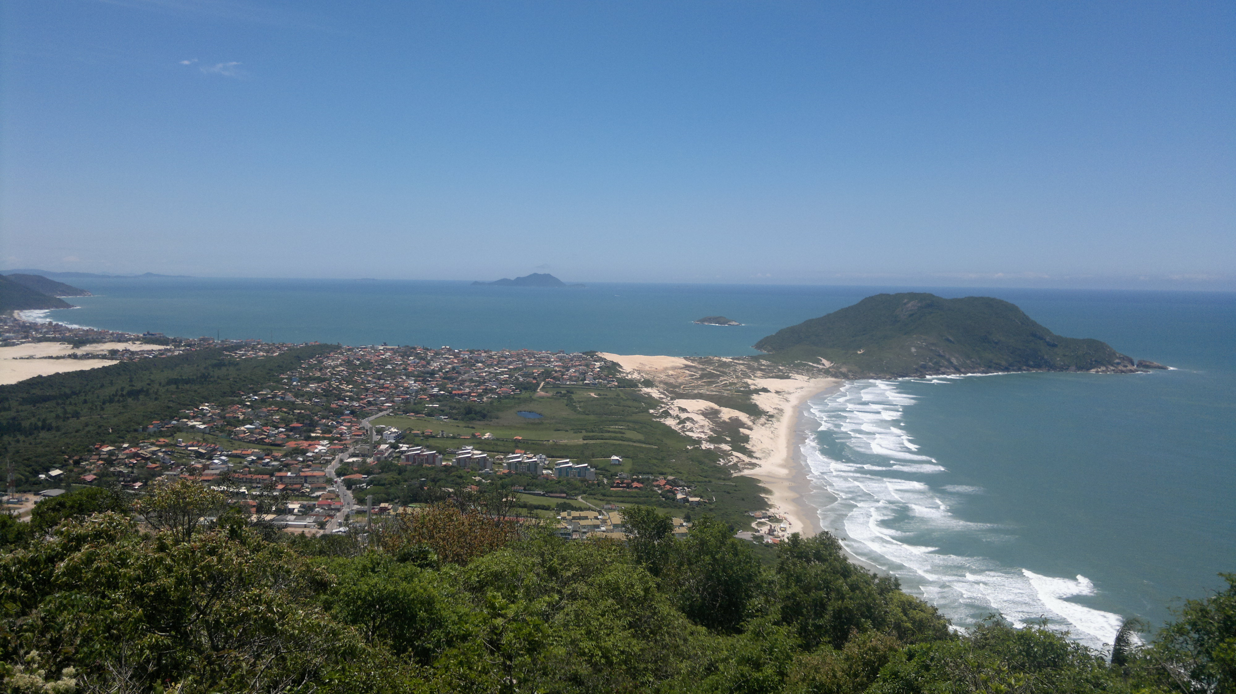 Bairro dos Ingleses, visto do Morro das Aranhas, Florianópolis/SC.